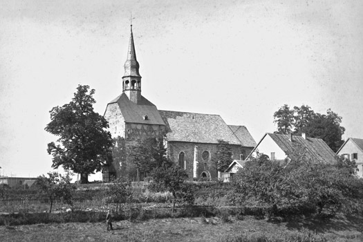 Lünen-Altlünen, katholische Kirche St. Marien, erbaut um 1260 (Turm von 1018), 1894-96 durch Neubau ersetzt